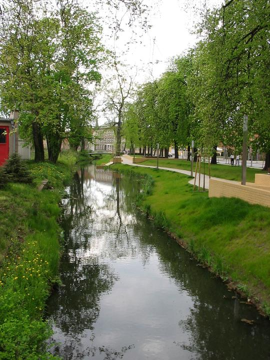 Nuthe_in_Luckenwalde_Brandenburg Selbst fotografiert, Mai 2004 GNU FDL